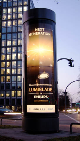 Lumiblade OLED-Kampagne Philips Stroer Hamburg